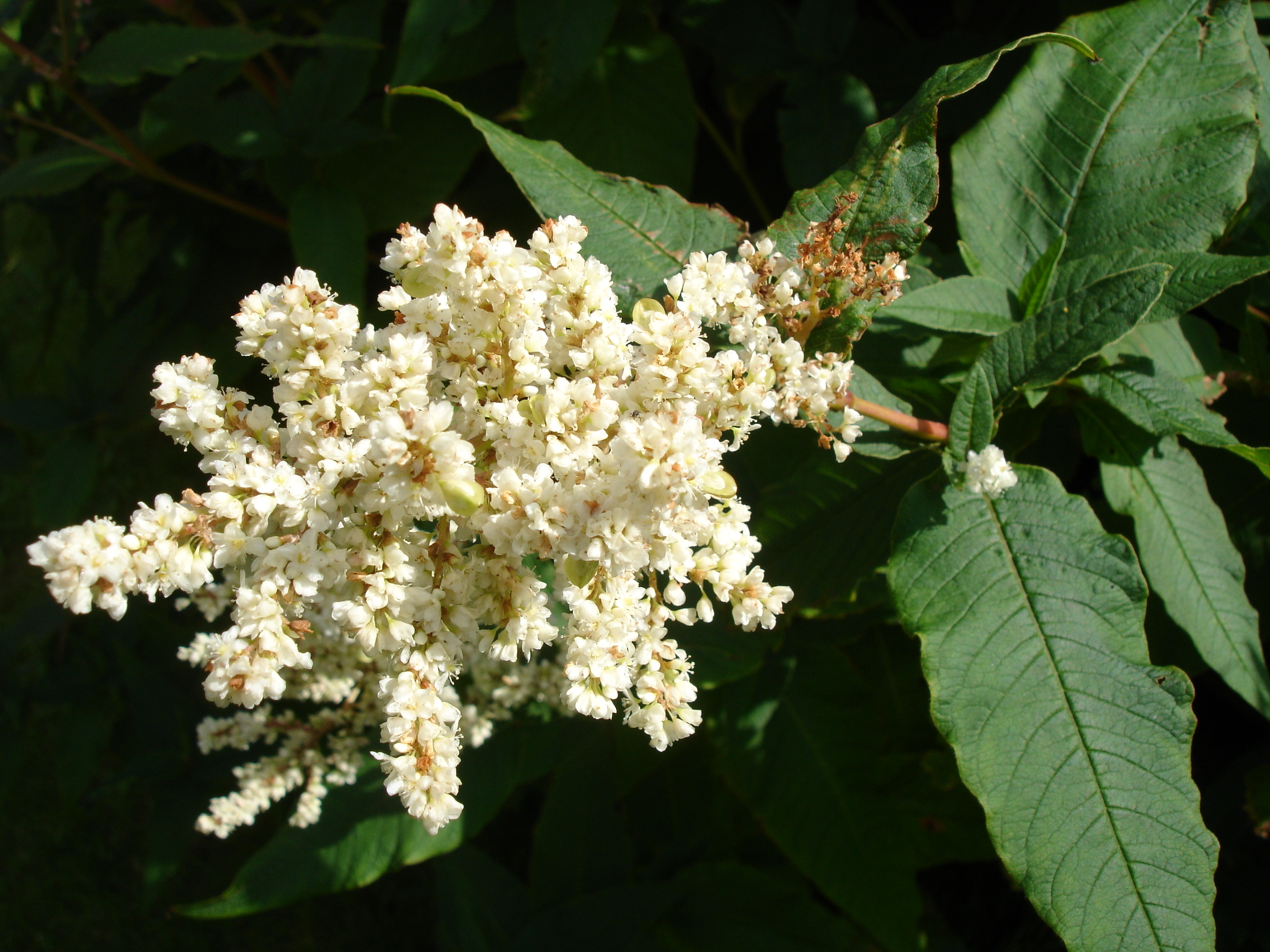 Aconogonon divaricatum